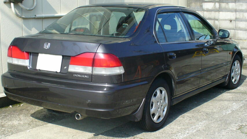 2代目ホンダ・ドマーニ（リア）